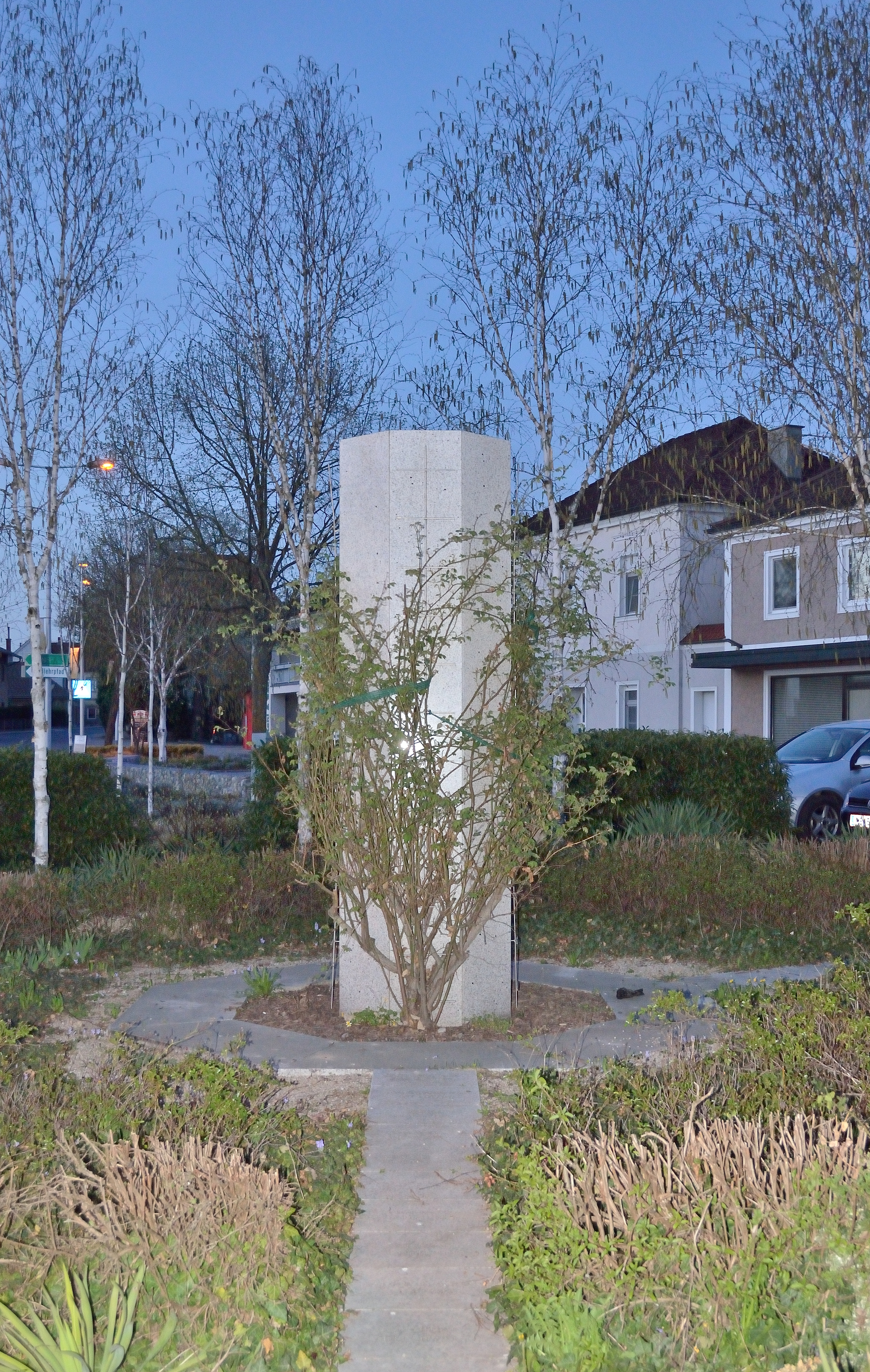 Die Arbeit Jenny Holzers soll an das erste Treffen der Alliierten in Österreich am 8. Mai 1945 erinnern. Das Werk besteht aus drei Teilen: einer einem Flak-Scheinwerfer nachempfundenen Stele mit weitreichendem Lichtstrahl, gravierten Bodenplatten und der Bepflanzung von Maria Auböck.